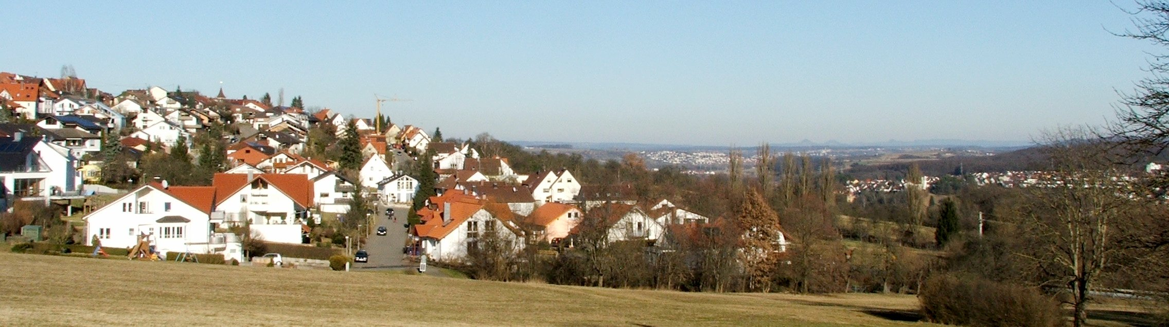 Blick aus Südwest auf Altenriet (links) und über den Neckar, Richtung Nürtingen und Schwäbische Alb.